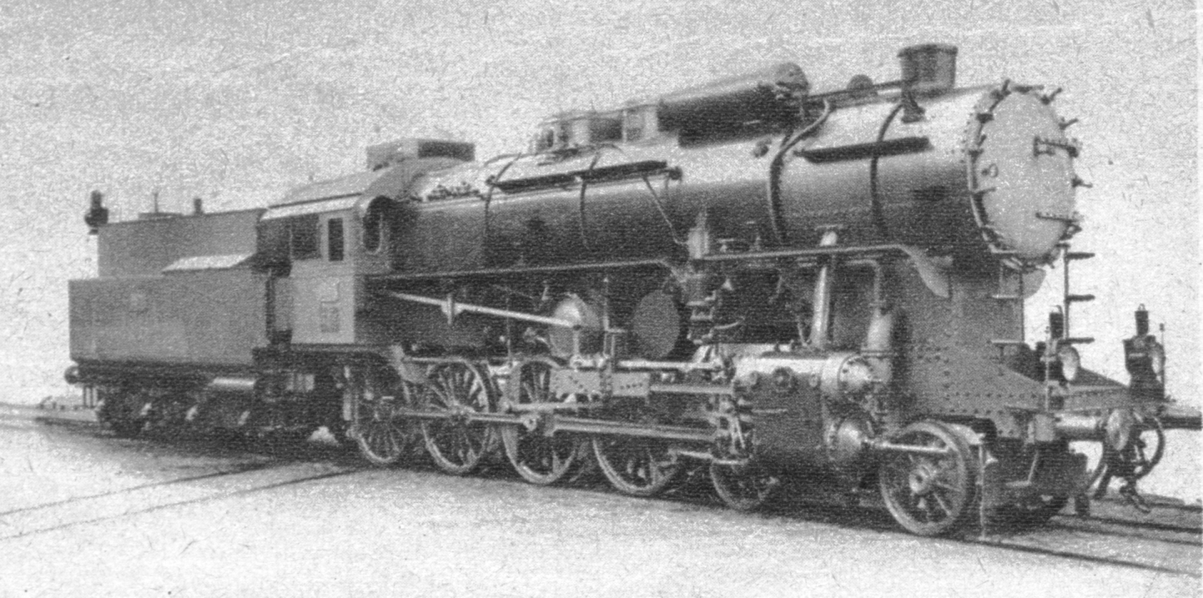 A MÁV részére készült legújabb mozdony